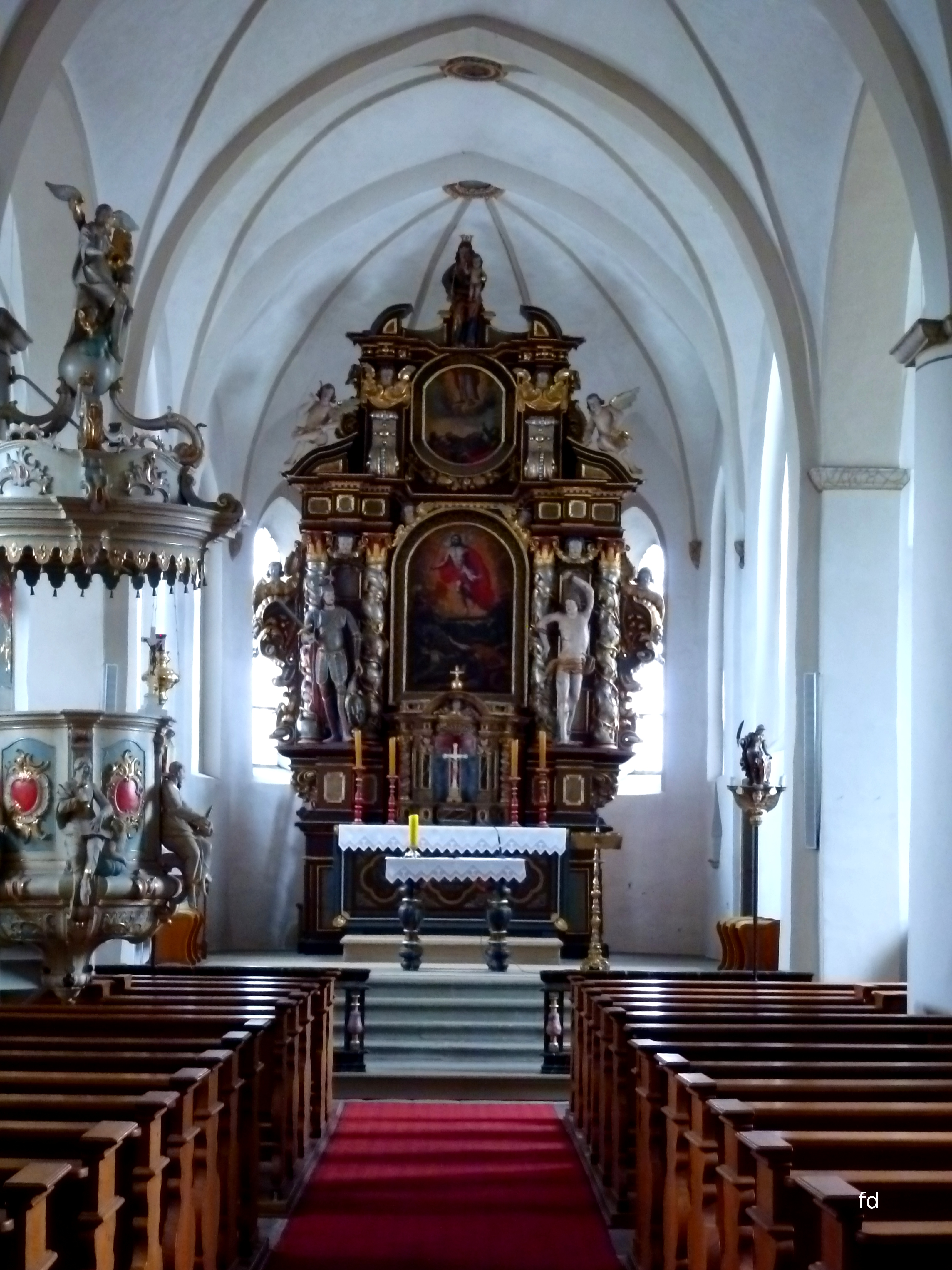 Warstein St.Pankratius und Sebastian Hochaltar.